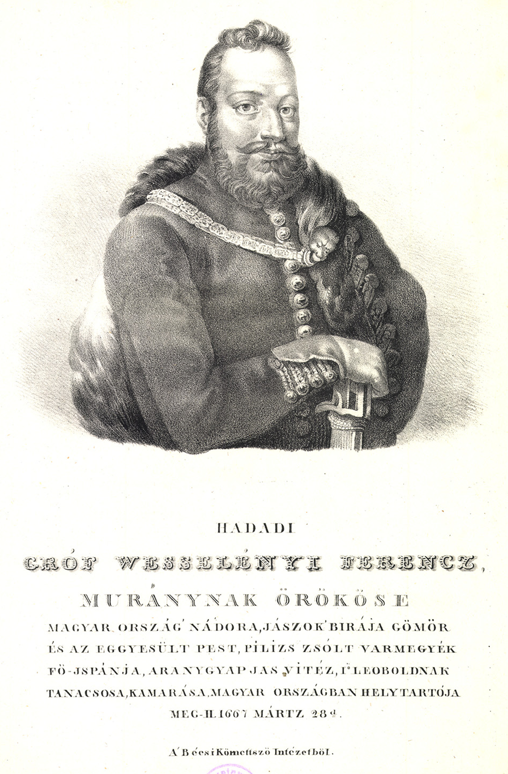 Hadadi és murányi gróf Wesselényi Ferenc (1605 – Zólyomlipcse, 1667. március 23.) magyar főnemes, hadvezér, 1655-től haláláig Magyarország nádora.